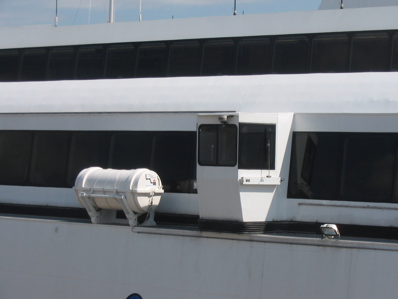 LifeRaft and Cookpit for get or leave shore. High speed car ferry "Natchan World" at OSANBASHI YOKOHAMA INTERNATIONAL PASSENGER TERMINAL. Yokohama City,Kanagawa Pref,Japan. March,7,2009